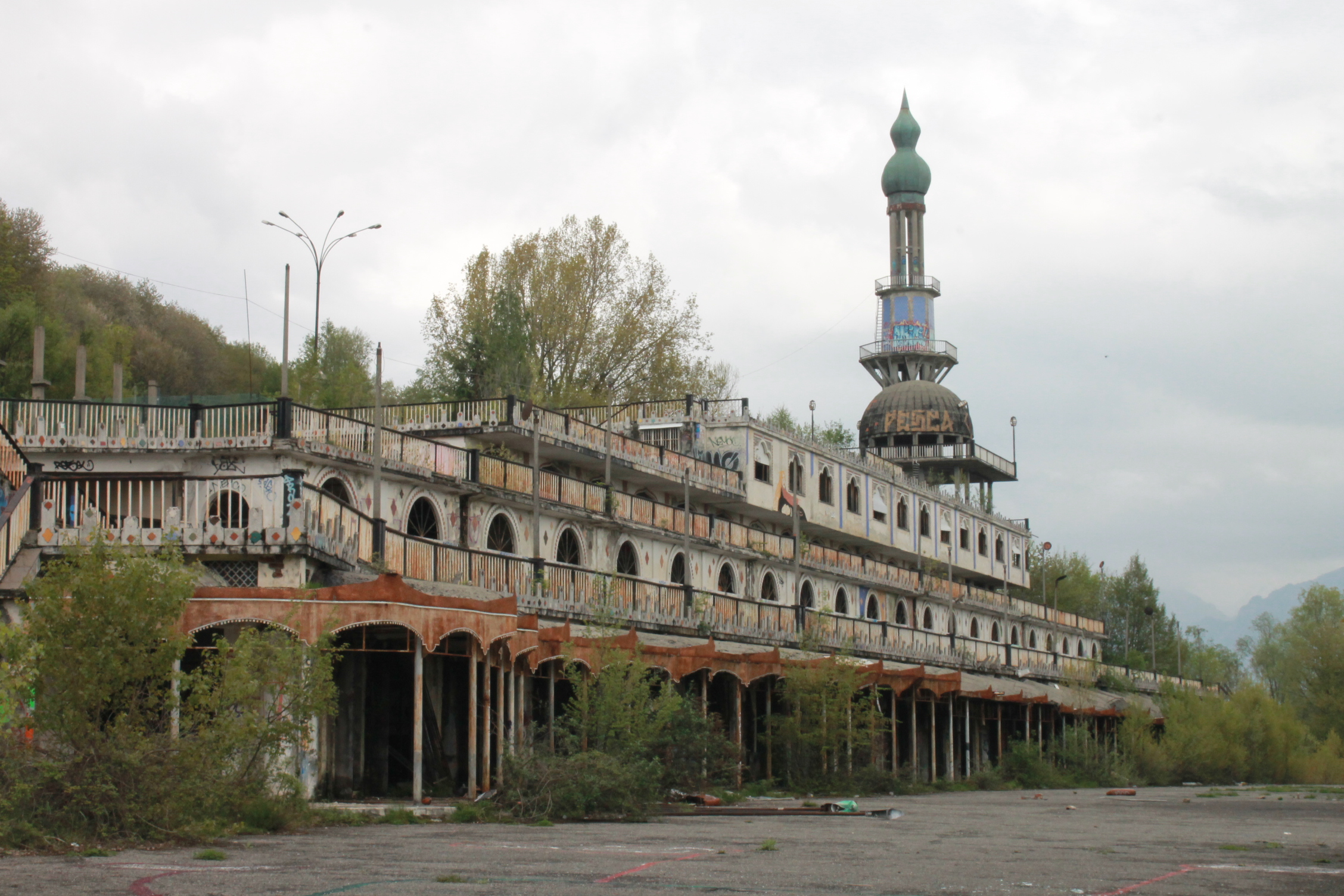 Minareto di Consonno - stato attuale